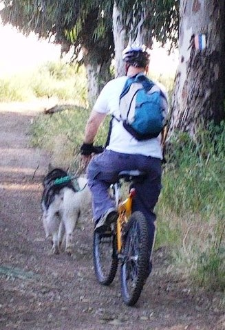 כלב בגודל בינוני יכול למשוך בקלות רוכב על אופניים. צולם בפארק מקורות הירקון.